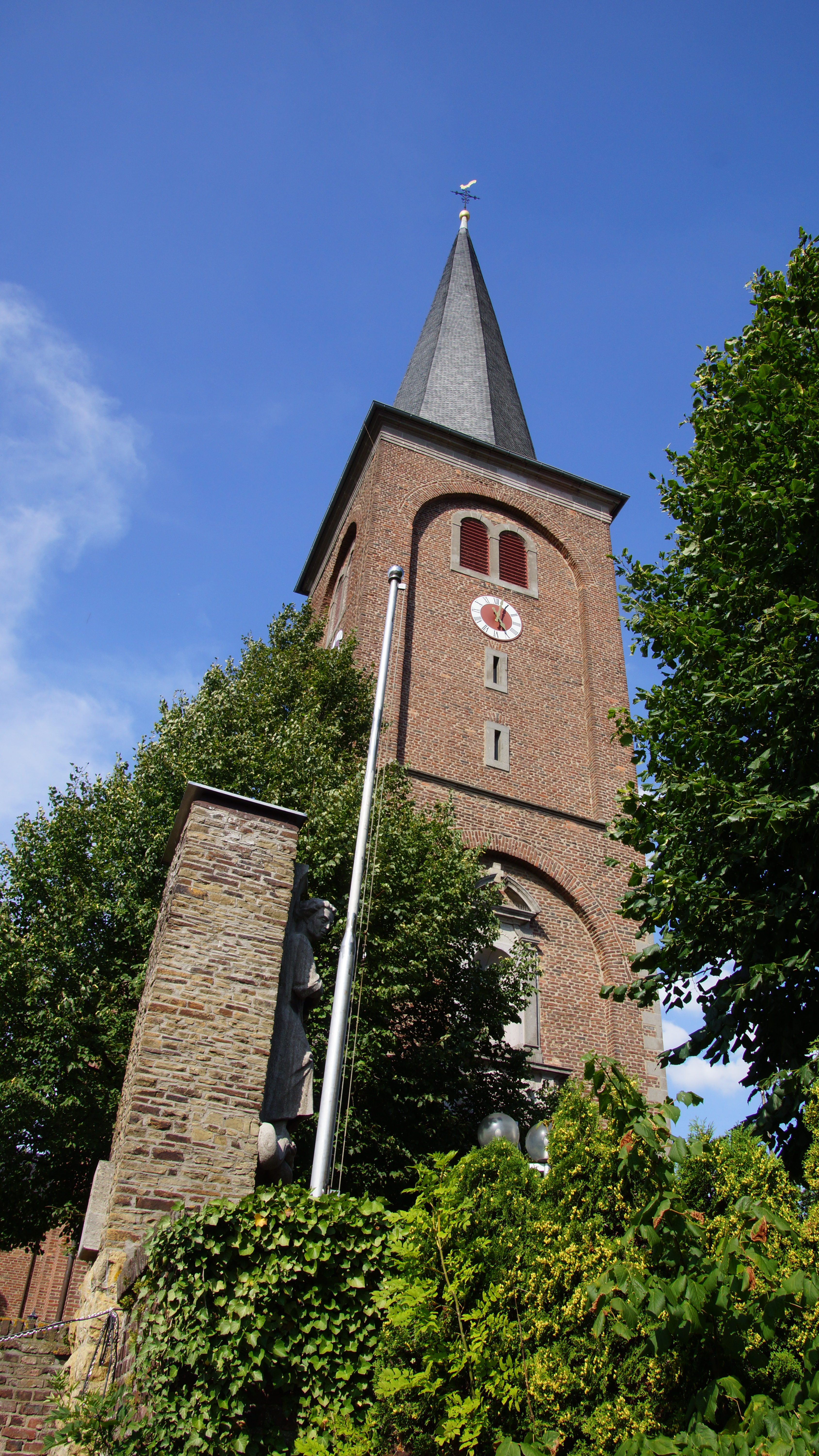 Heilig-Kreuz-Kirche Vernich, Trierer Straße